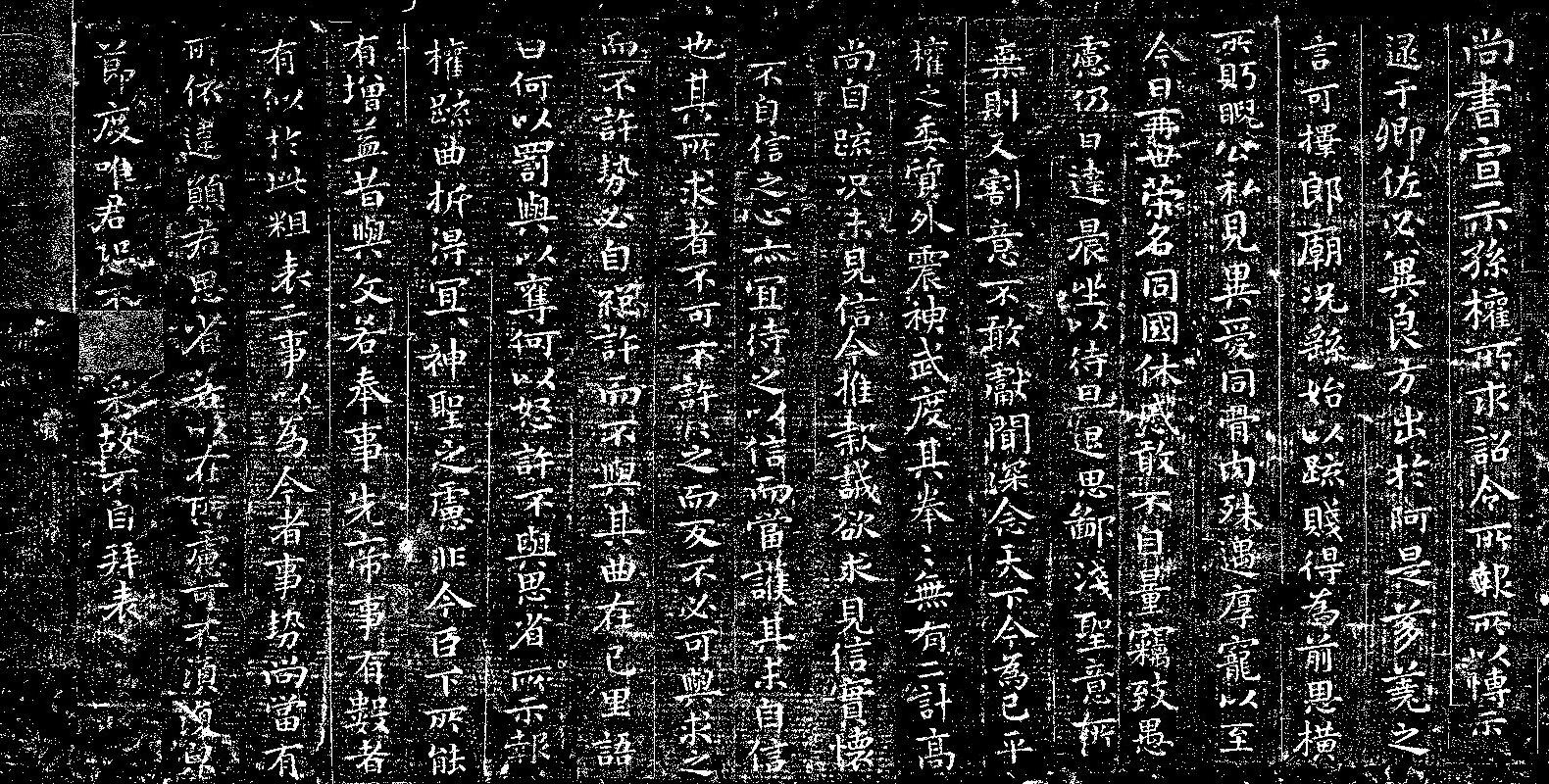 文言: 故宮博物院藏賈似道刻宣示表